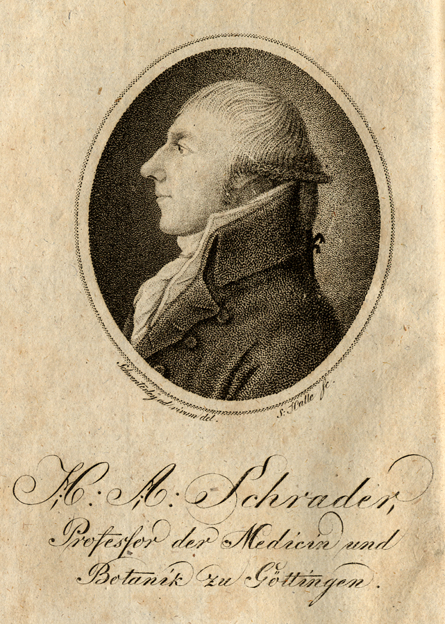 Porträt des Göttinger Botanikers Heinrich Adolf Schrader